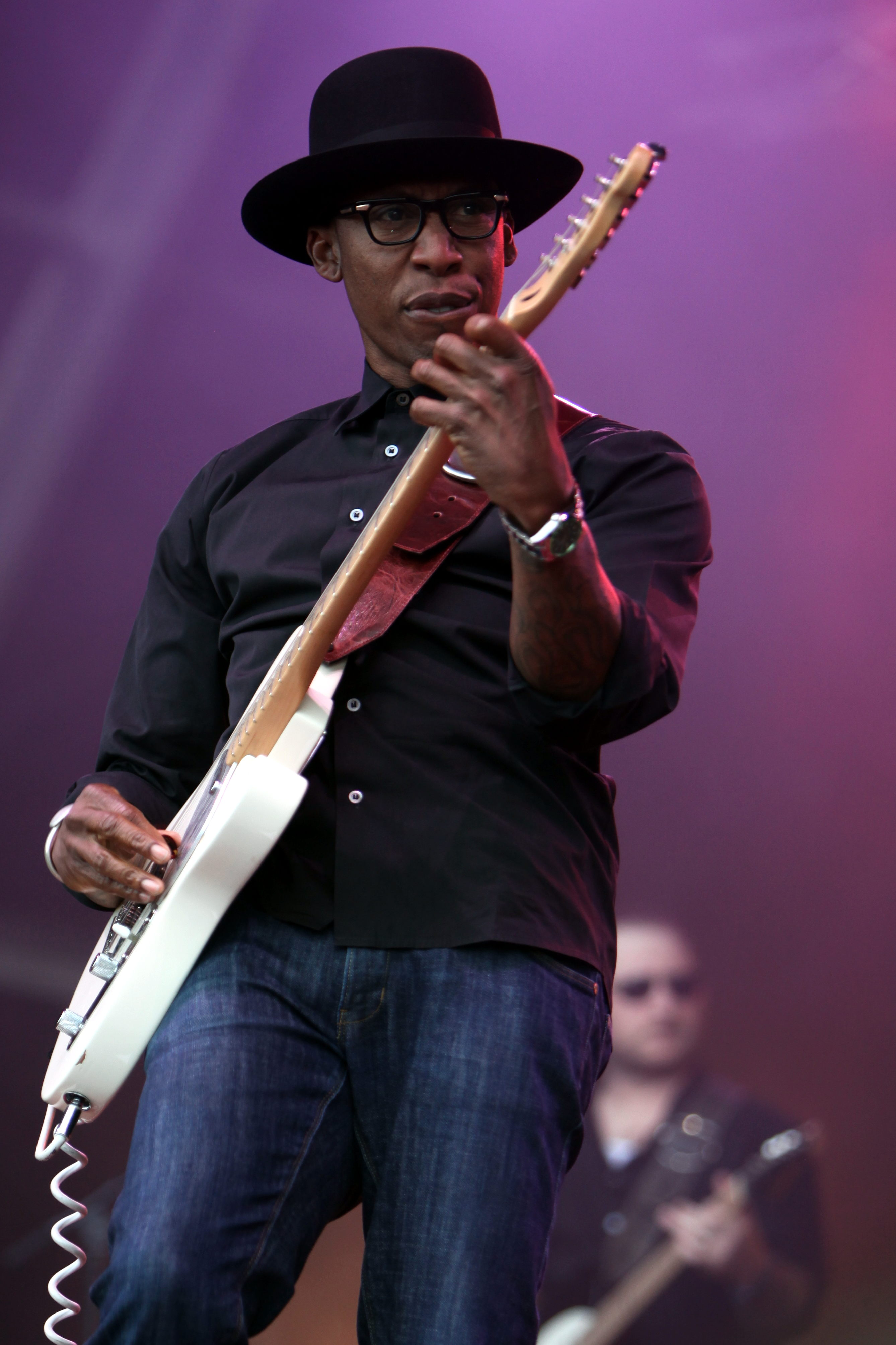 Raphael Saadiq at the Eurockéennes de Belfort 2011